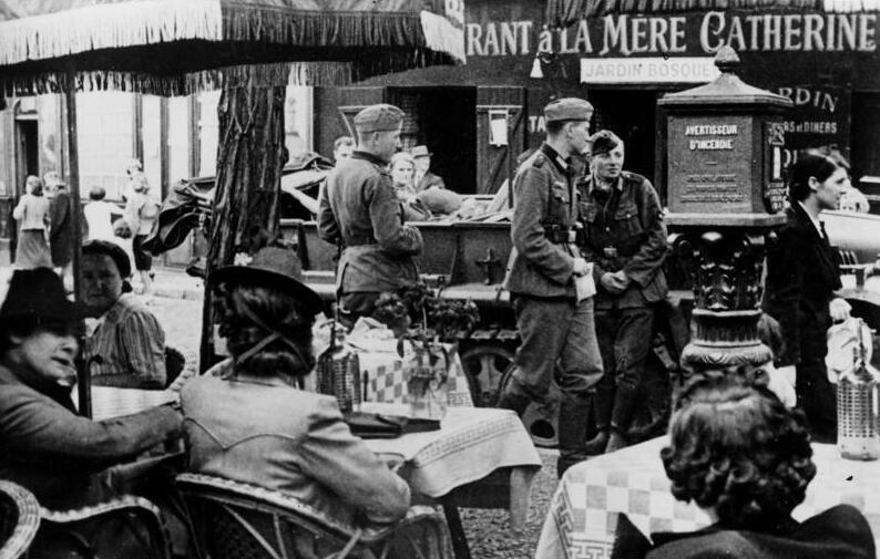 Paris, deutsche Soldaten vor einem Restaurant Zentralbild: 2. Weltkrieg 1939-1945 Pariser Strassenbild (Juni 1940) ADN-ZB/Archiv: II. Weltkrieg 1939-45 Frankreich während der faschistischen deutschen Besetzung; Ende Juni 1940 Nach dem deutschen Einmarsch in Paris am 14. Juni bestimmen deutsche Soldaten das Straßenbild; hier vor einem Cafe. Aufnahme Teschendorff 8020-40 Information added by Wikimedia users. Restaurant à la mère Cathèrine, place du Tertre, 75018 Paris